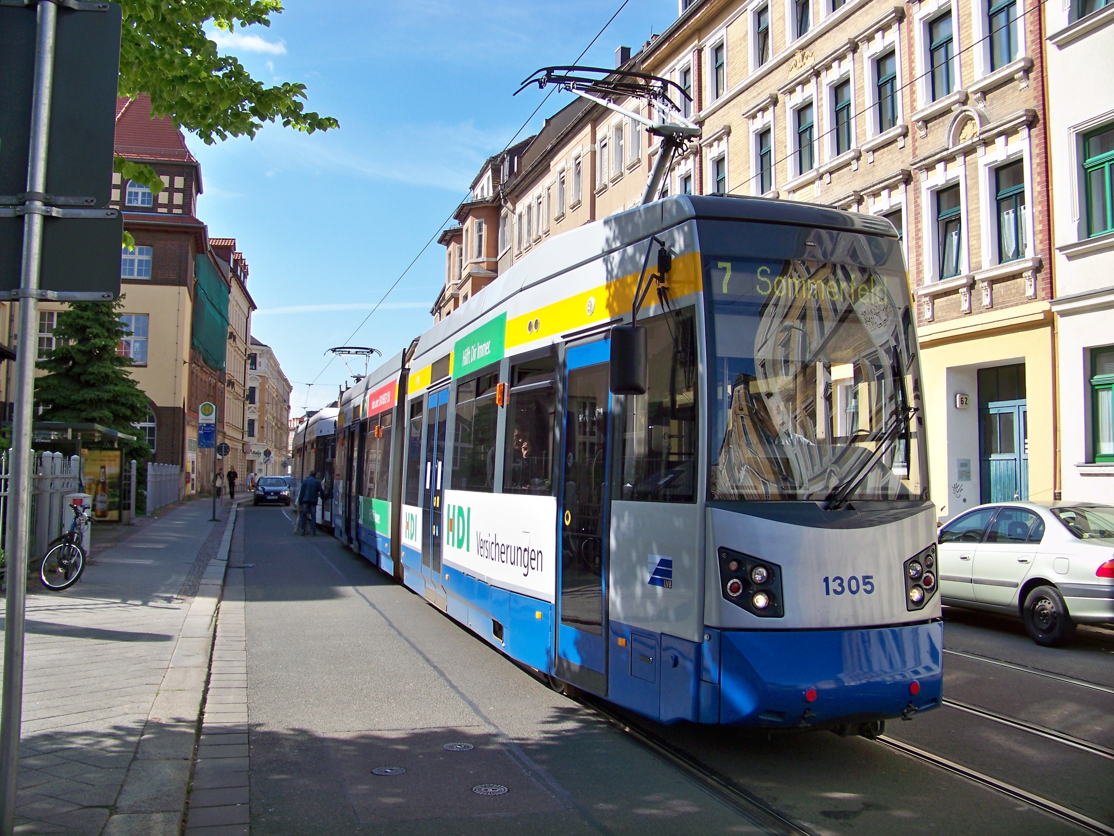 Eine Leoliner-Doppeltraktion der Leipziger Verkehrsbetriebe auf der Linie 7 (Böhlitz-Ehrenberg–Sommerfeld) in der Georg-Schwarz-Straße in Leipzig-Lindenau an der Haltsstelle Diakonissenhaus